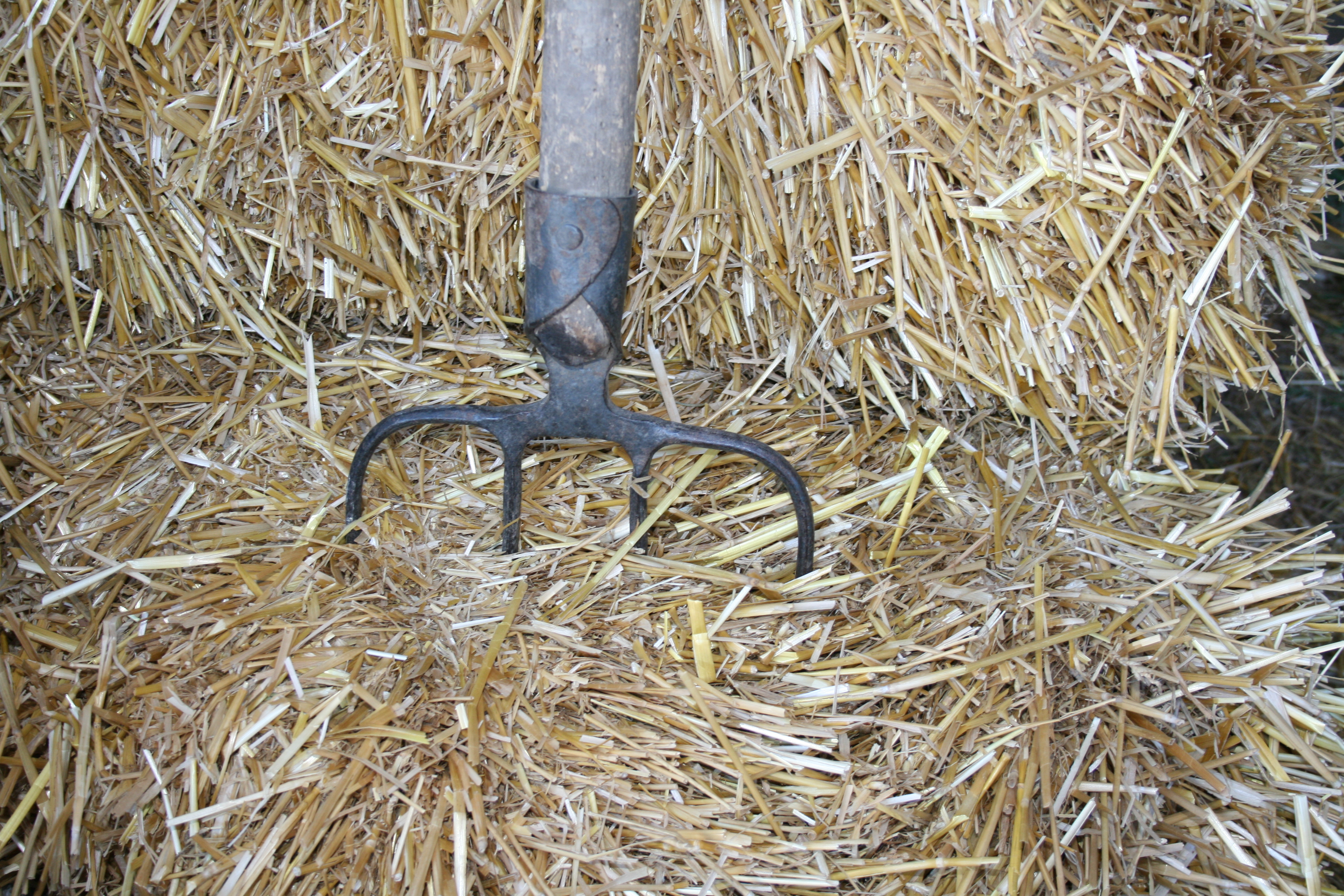 Атамань — этнотуристический комплекс казачей станицы на Таманском полуострове (Краснодарский край).